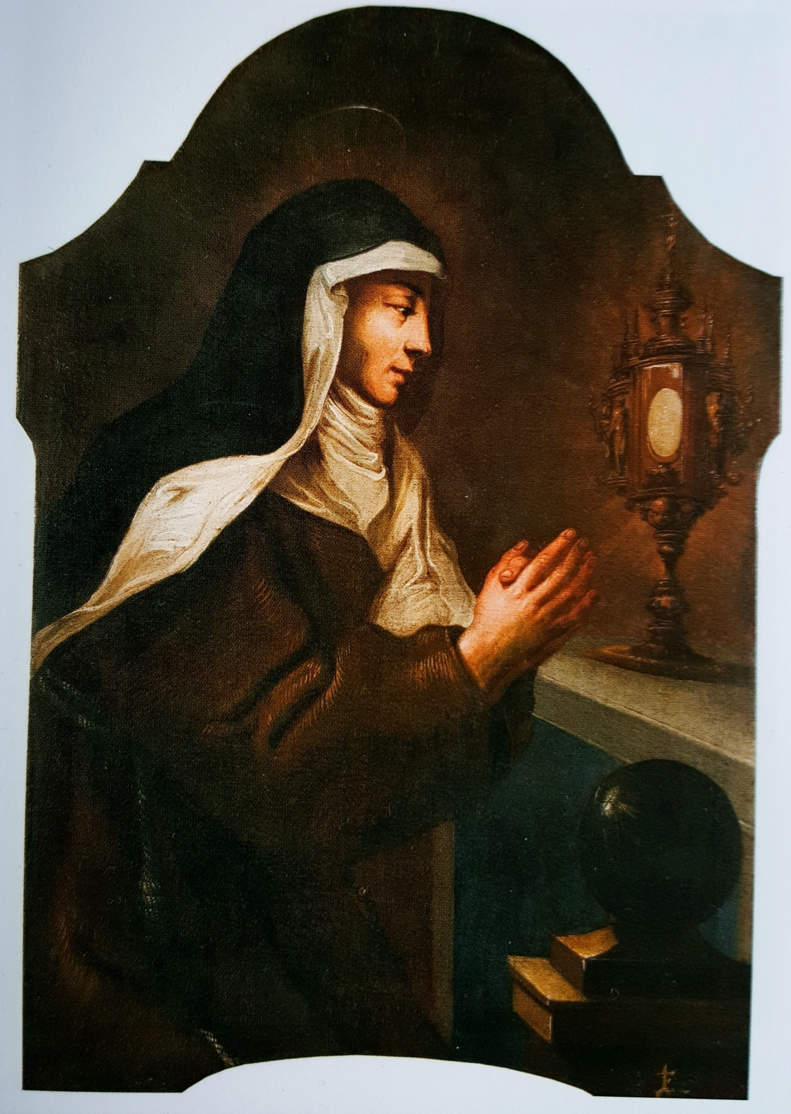 Święta Klara - 1710, 102 × 75, Muzeum Narodowe we Wrocławiu